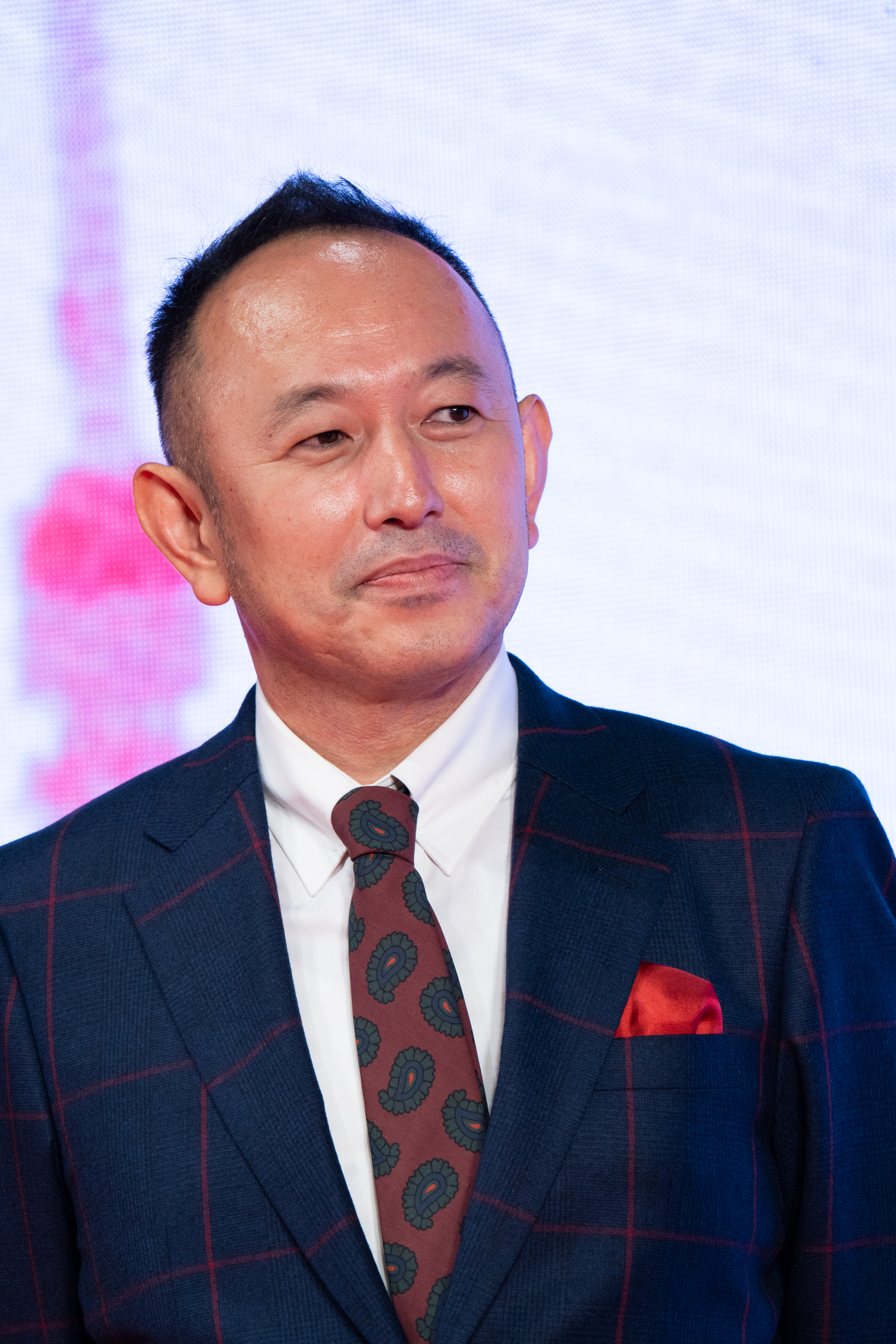 第32回 東京国際映画祭 オープニングセレモニー 足立紳 (喜劇 愛妻物語)